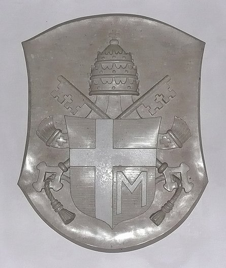 Papstwappen in der Stiftskirche St. Florian, Oberösterreich